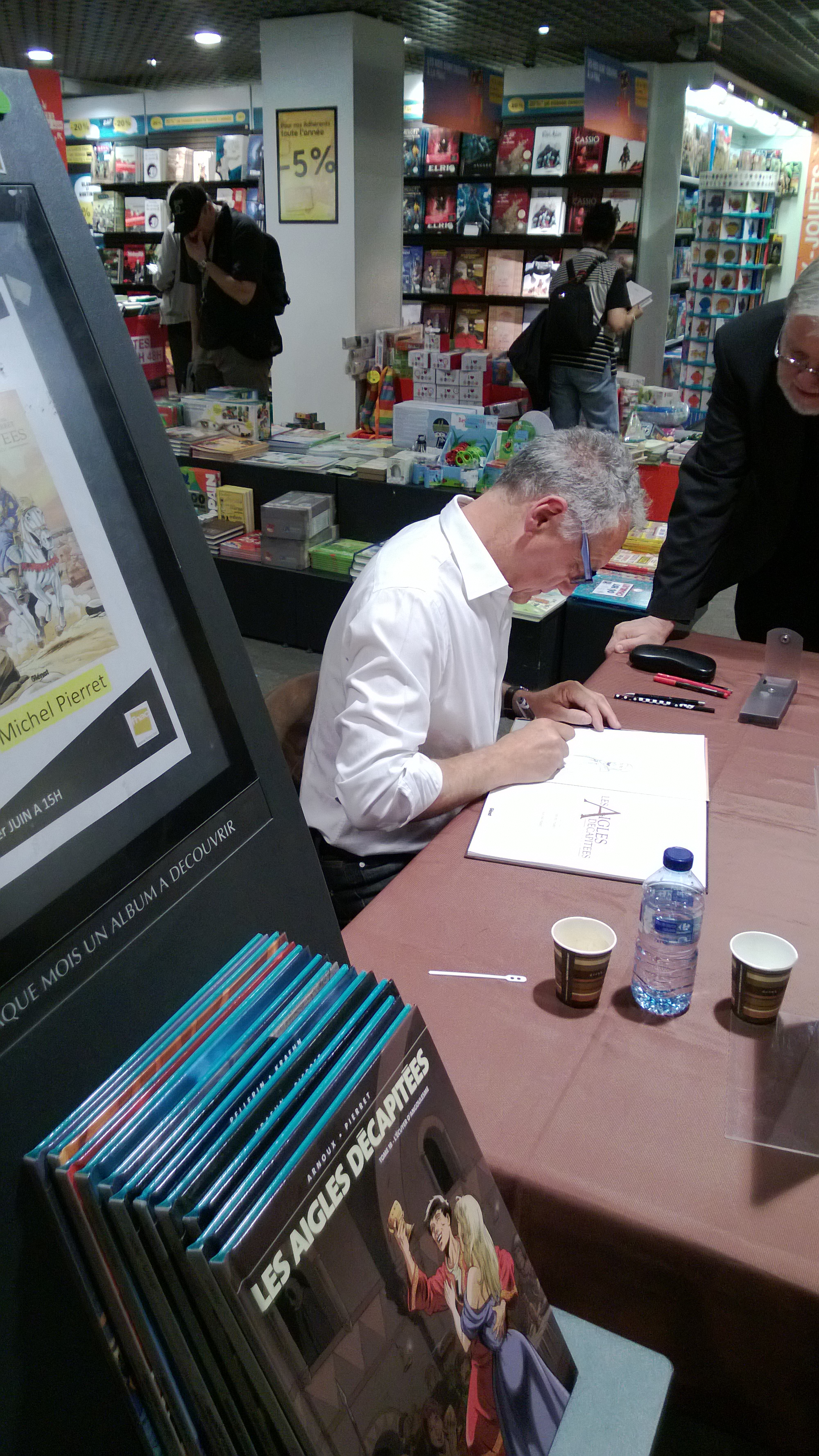 Michel Pierret dédicace son 25ème album